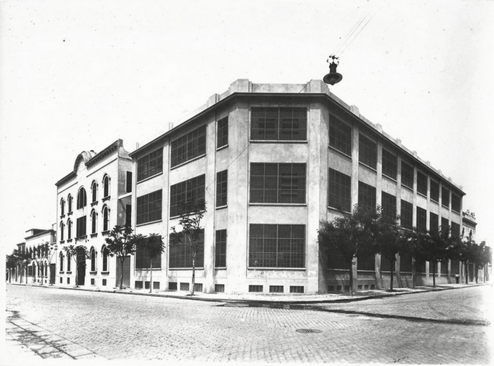 El edificio de la fábrica metalúrgica del empresario José Ferrrini, fundada en 1914. Ocupaba la mayor parte de una manzana.